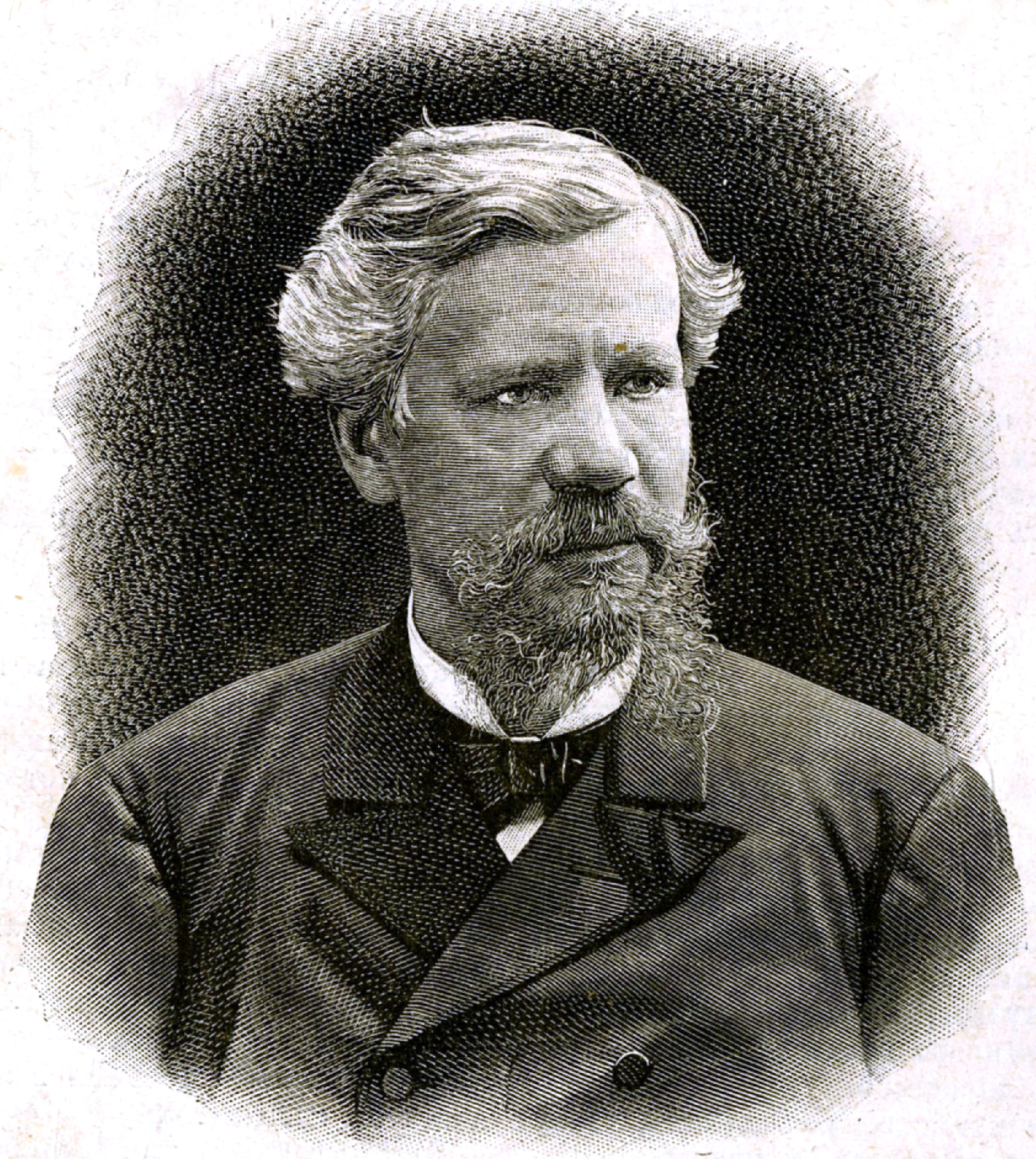 Коялович, Михаил Осипович